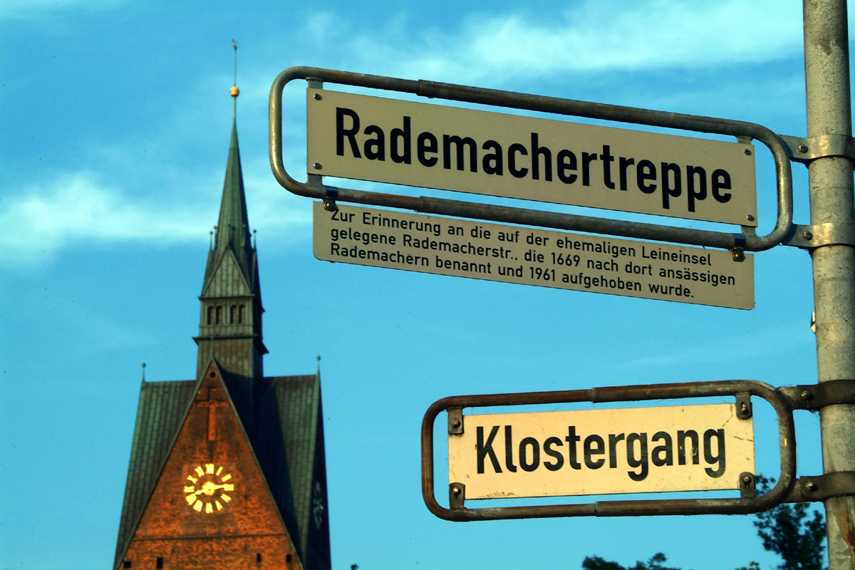 Die Legendentafel am Straßenschild der Rademacherstraße belegt - als offizielles Dokument der Stadt Hannover: "Zur Erinnerung an die auf der ehemaligen Leineinsel gelegene Rademacherstraße, die 1669 nach dort ansässigen Rademachern benannt und 1961 aufgehoben wurde" ...